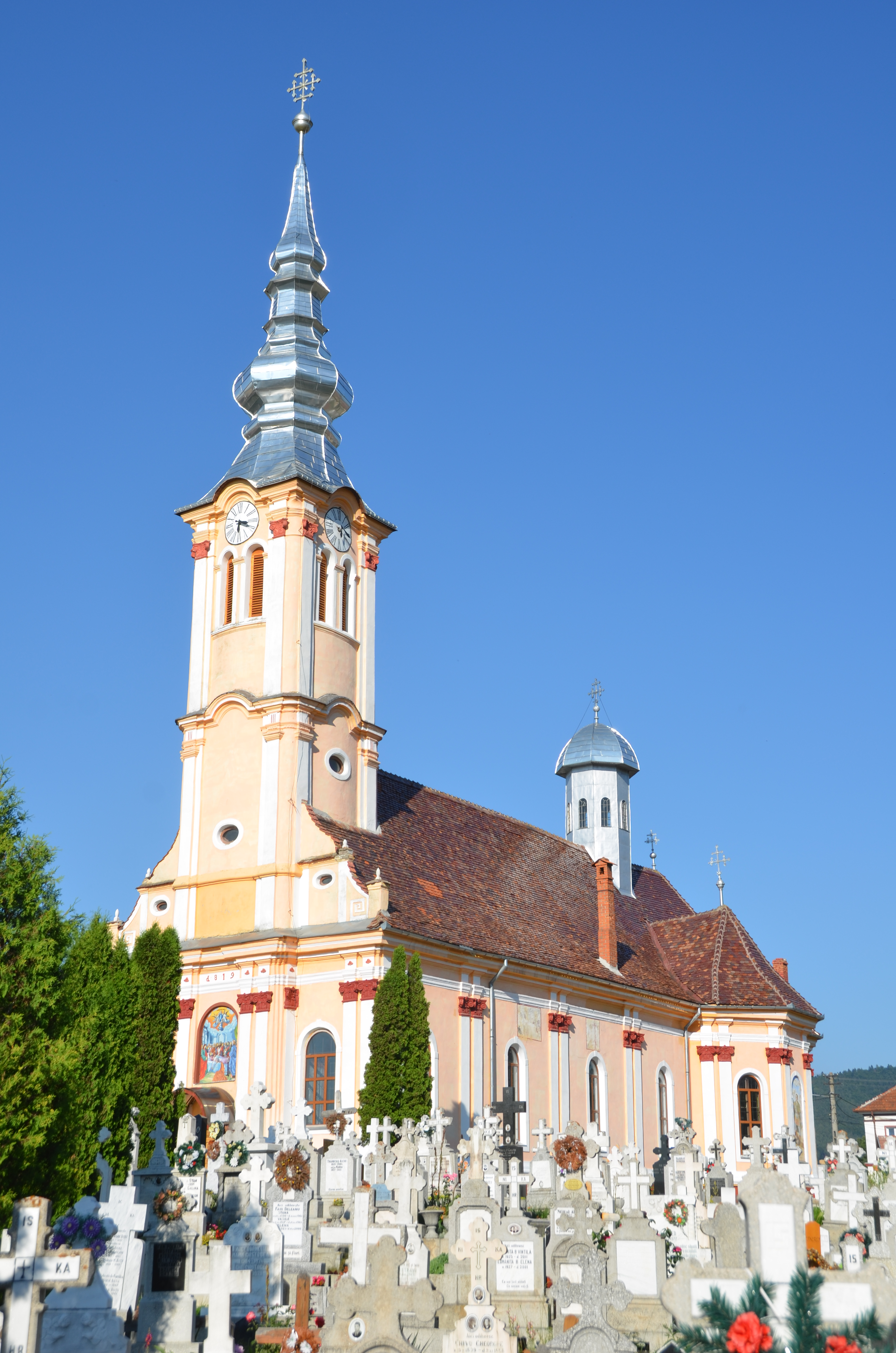 Ansamblul bisericii „Sf. Adormire a Maicii Domnului”